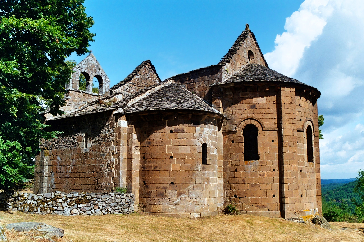 France - Auvergne - Cantal - Antignac - Chapelle Notre-Dame du Roc-Vignonnet (en 2003, avant la restauration de 2004-2005)